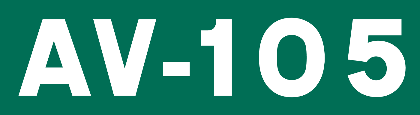 Cajetín de la carretera autonómica AV-105